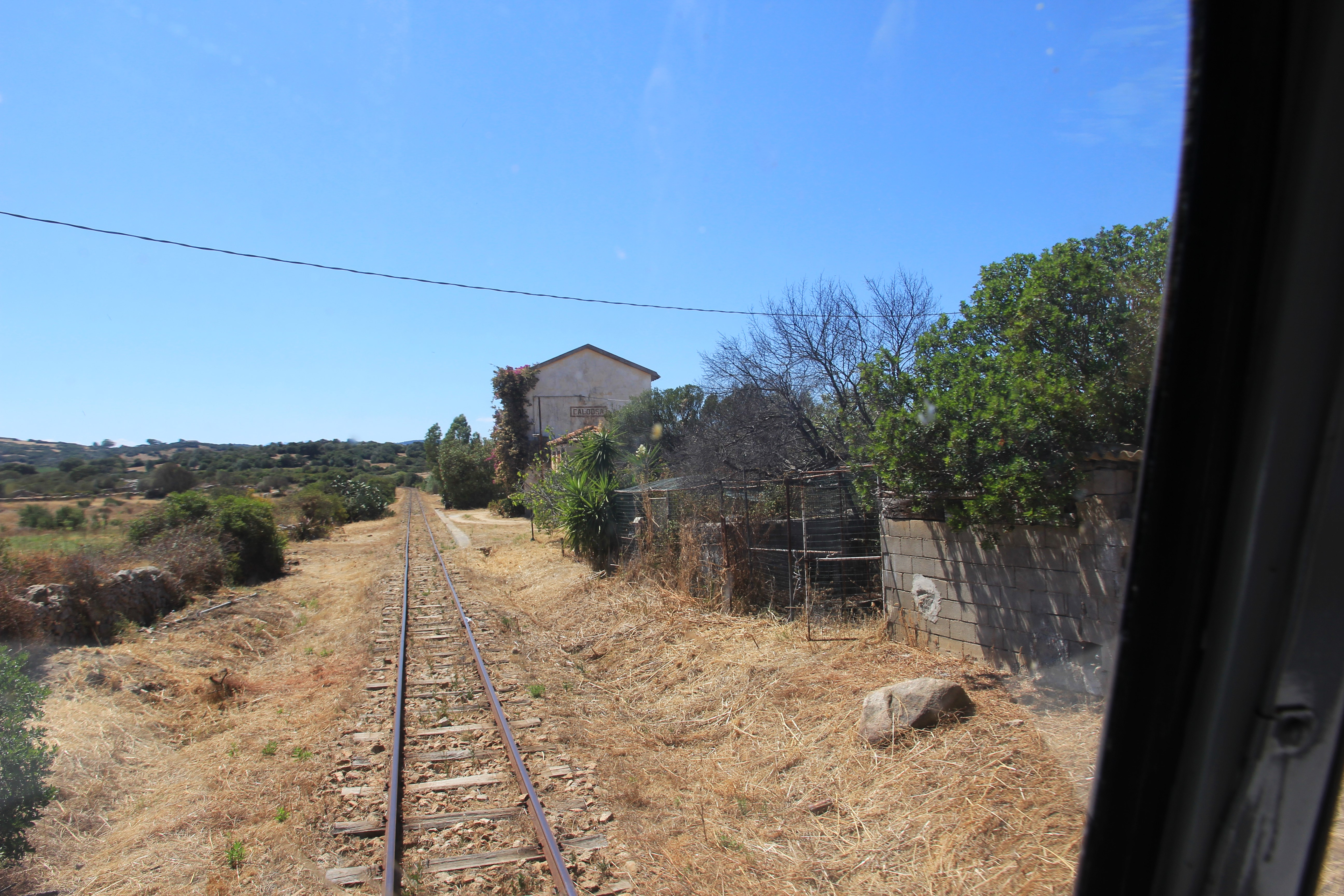 Arzachena, stazione ferroviaria di Caldosa